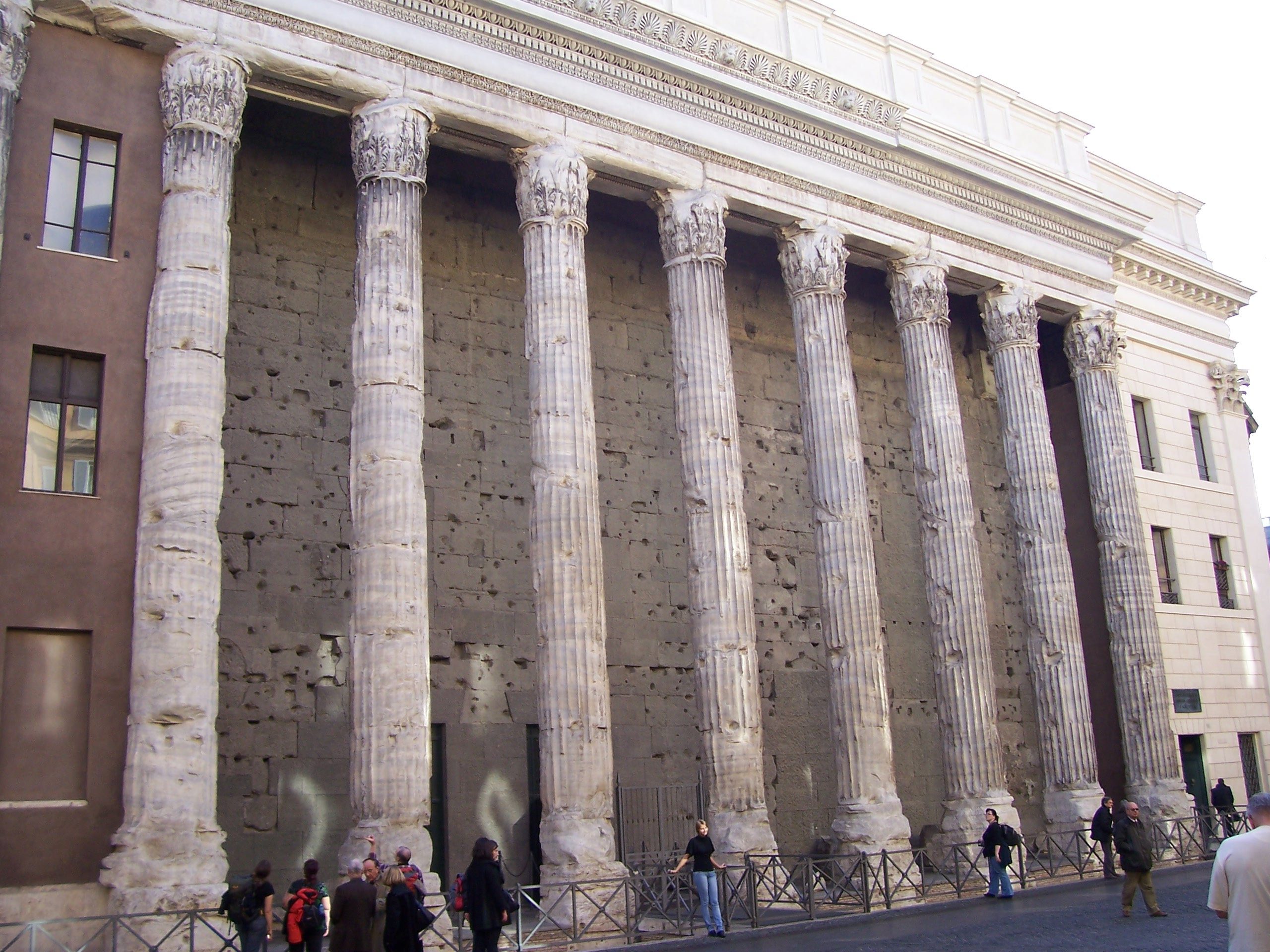 Tempio di Adriano a piazza di Pietra (sede Camera di Commercio di Roma